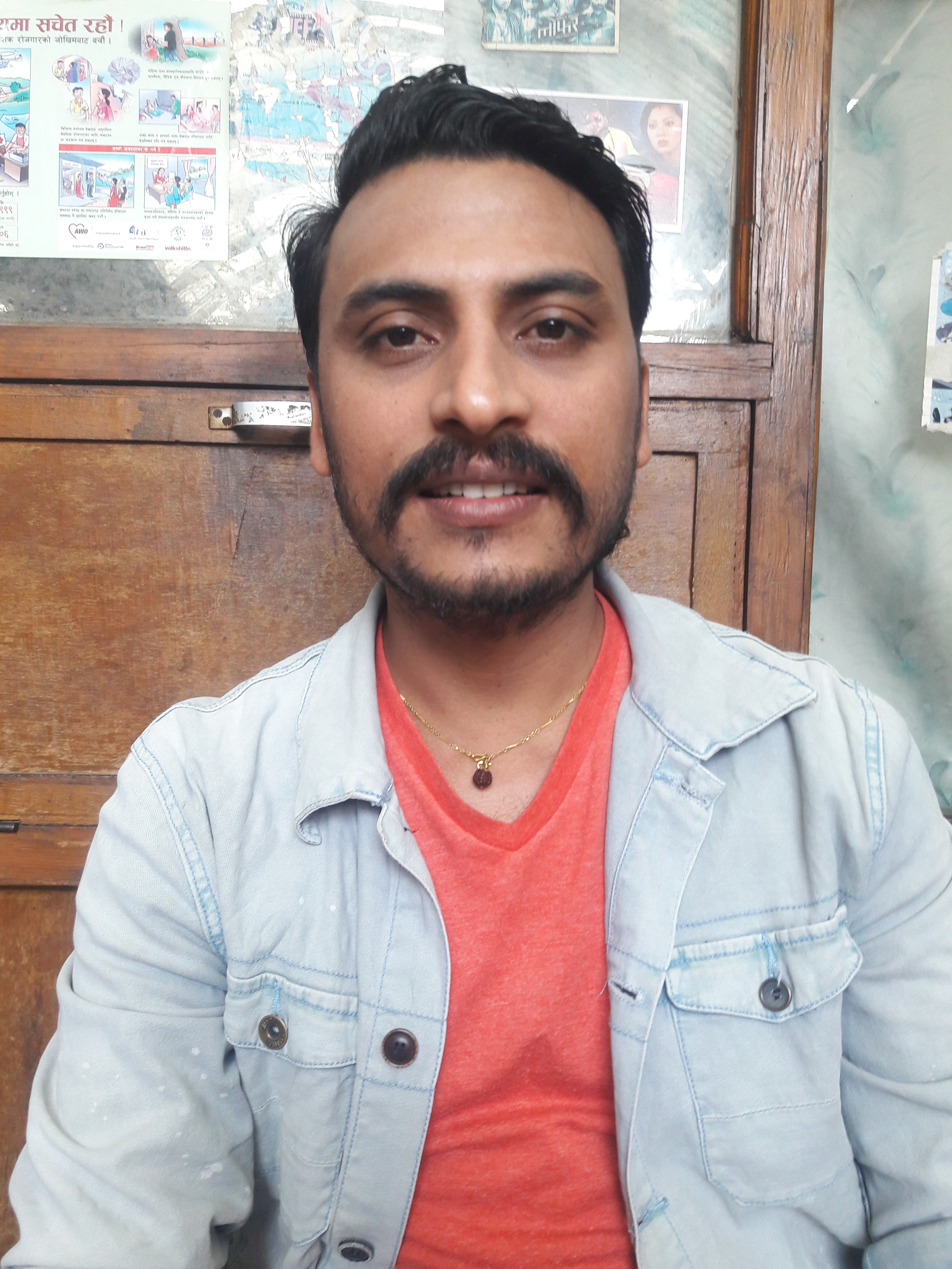 नेपाली: युवराज चौलागाई, नेपाली